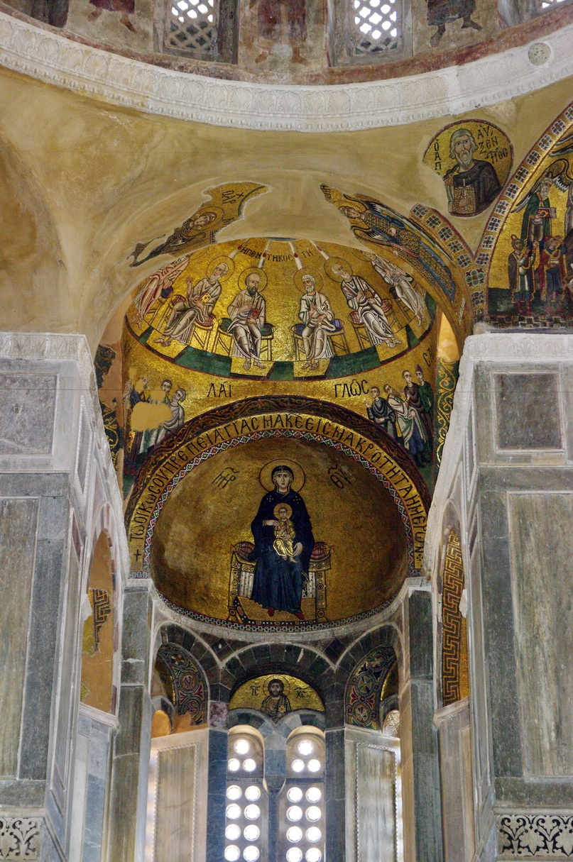 Kuppel Katholikon Kloster Osios Loukas